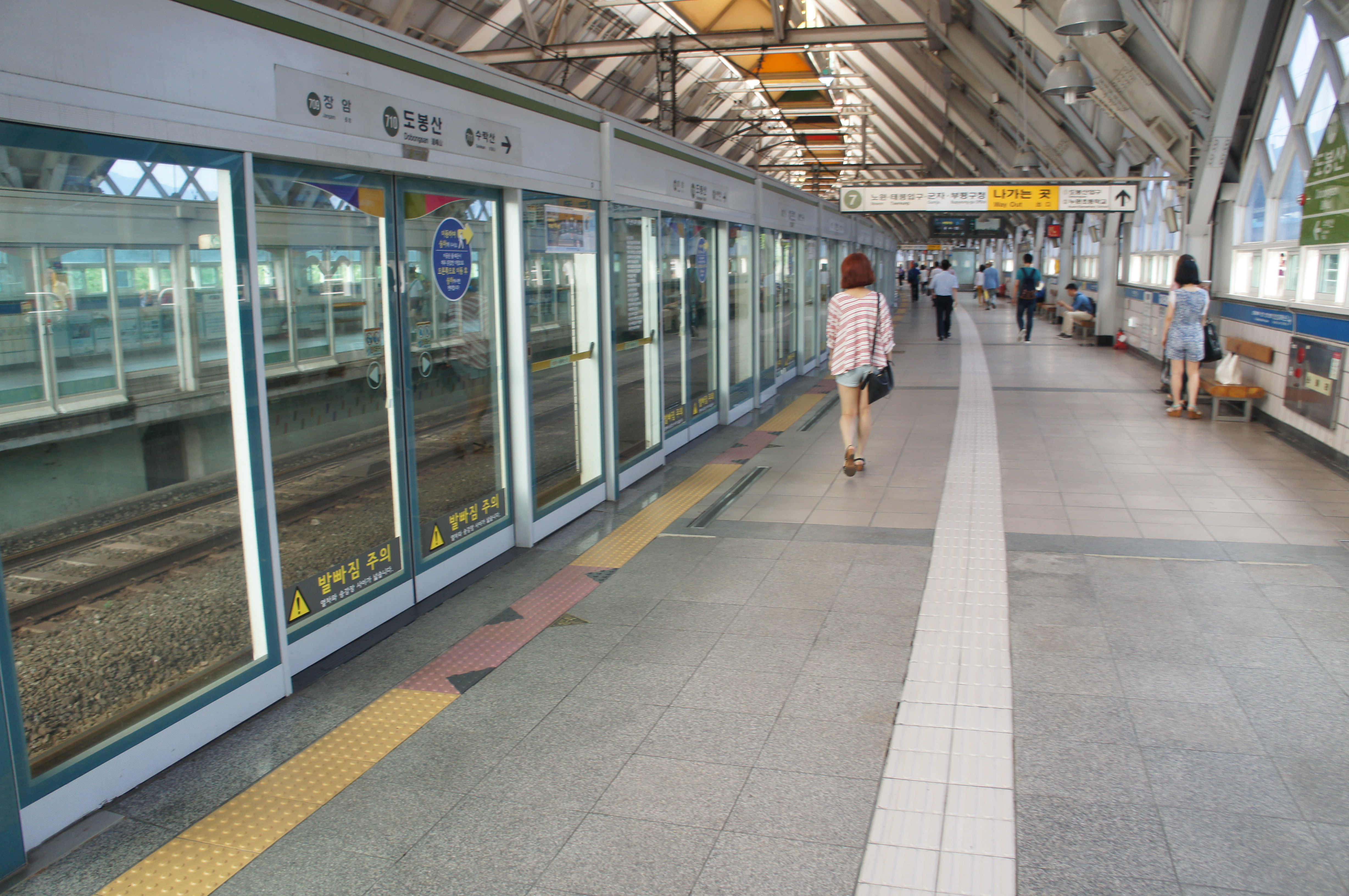 7호선 도봉산역 승강장